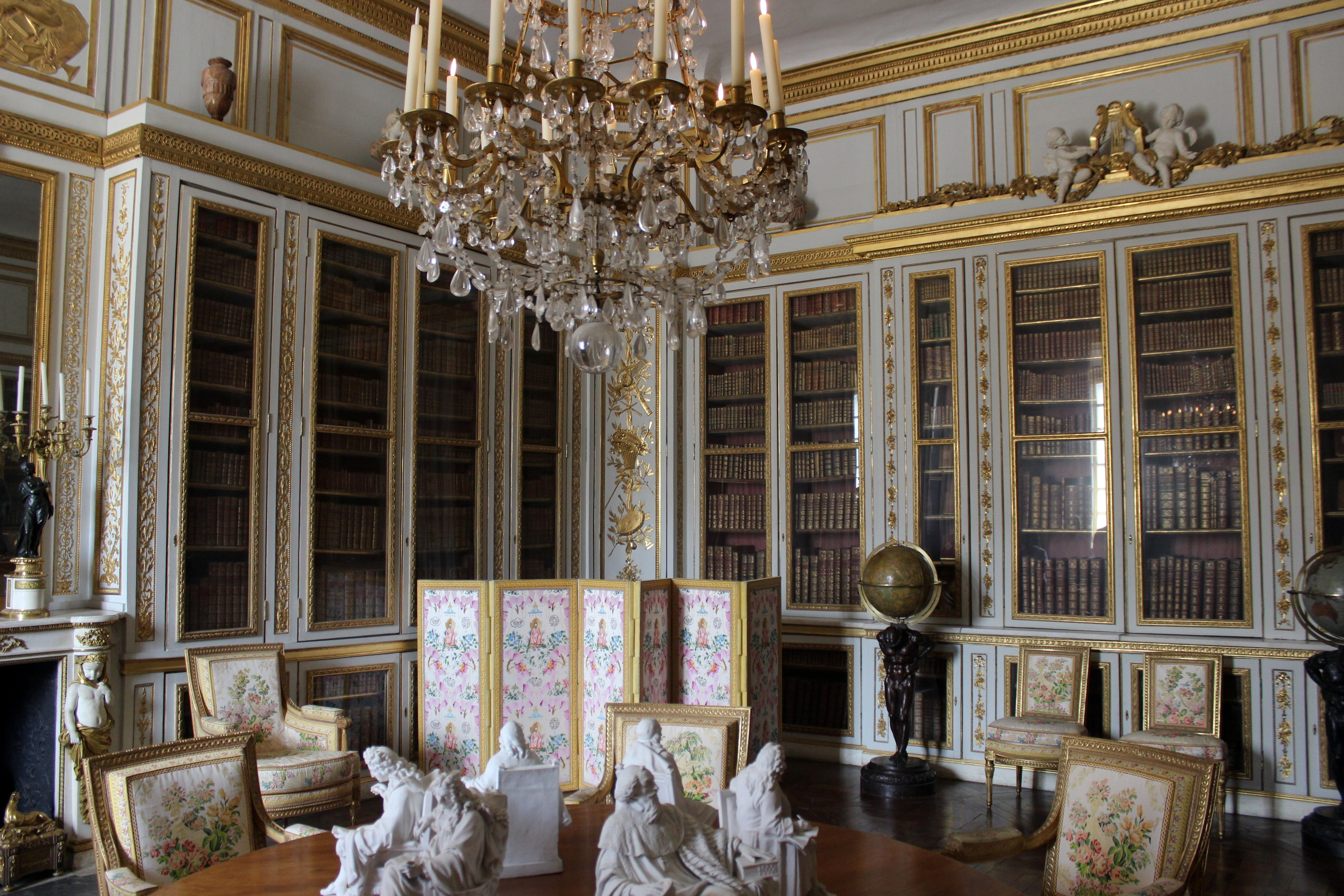 Palacio de Versalles. Biblioteca de Luis XVI. .